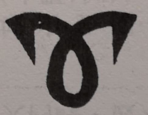 昭和30年1月１日に町制施行し、平成16年4月1日に合併により廃止された京都府中郡峰山町の町章。